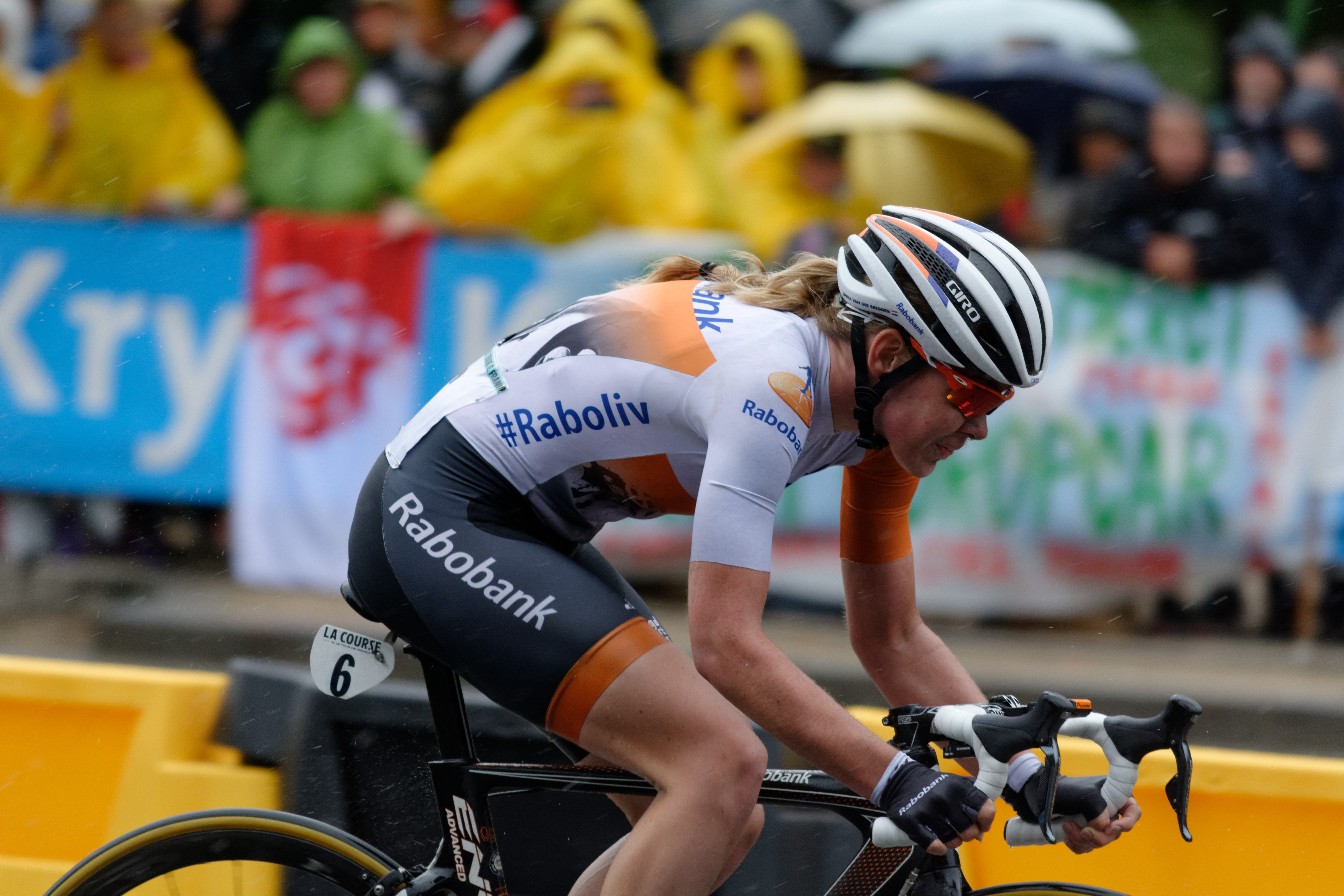 D71_2260_DxO